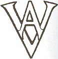 AV Logo